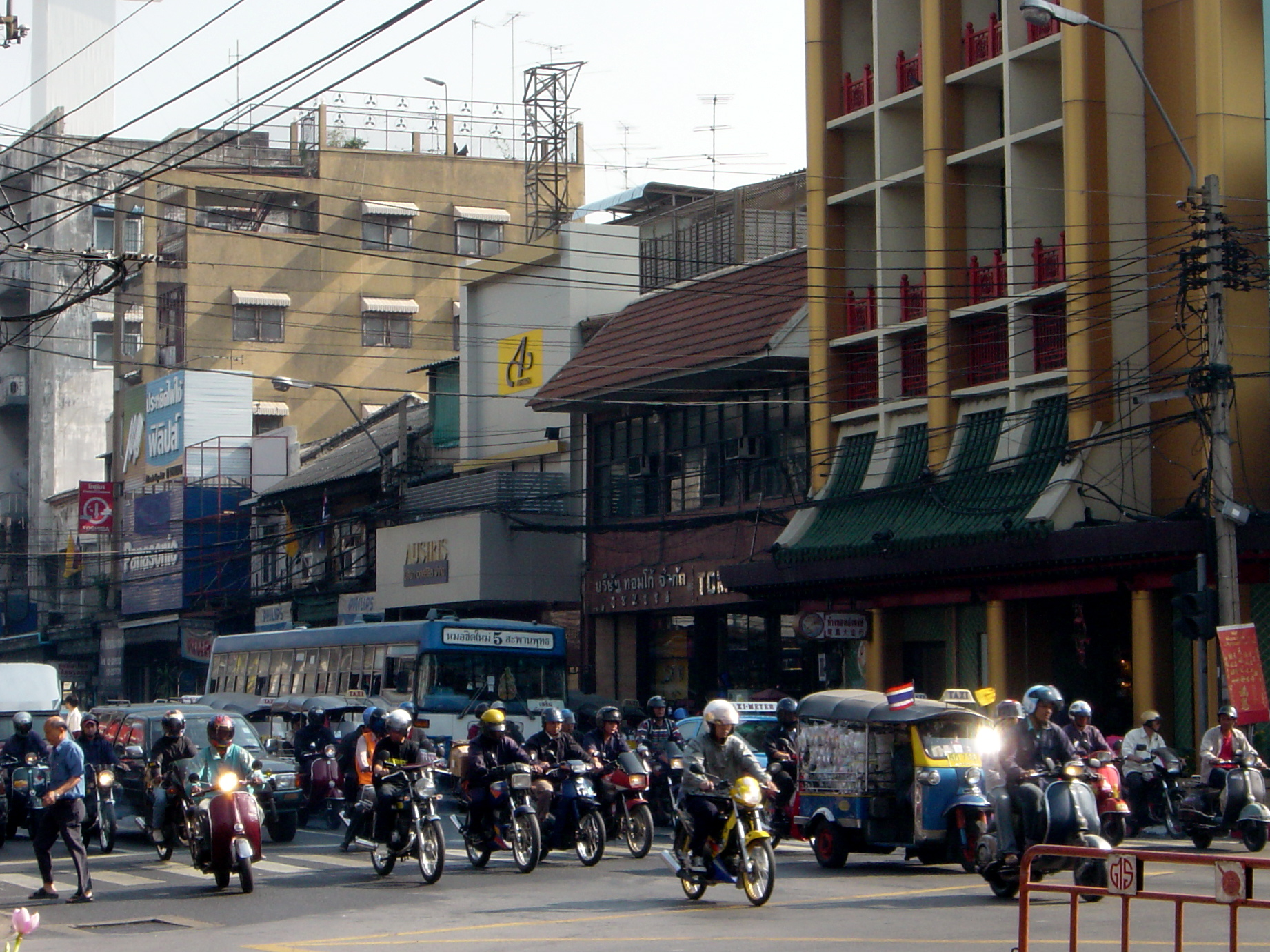 Bangkok street Rush Hour